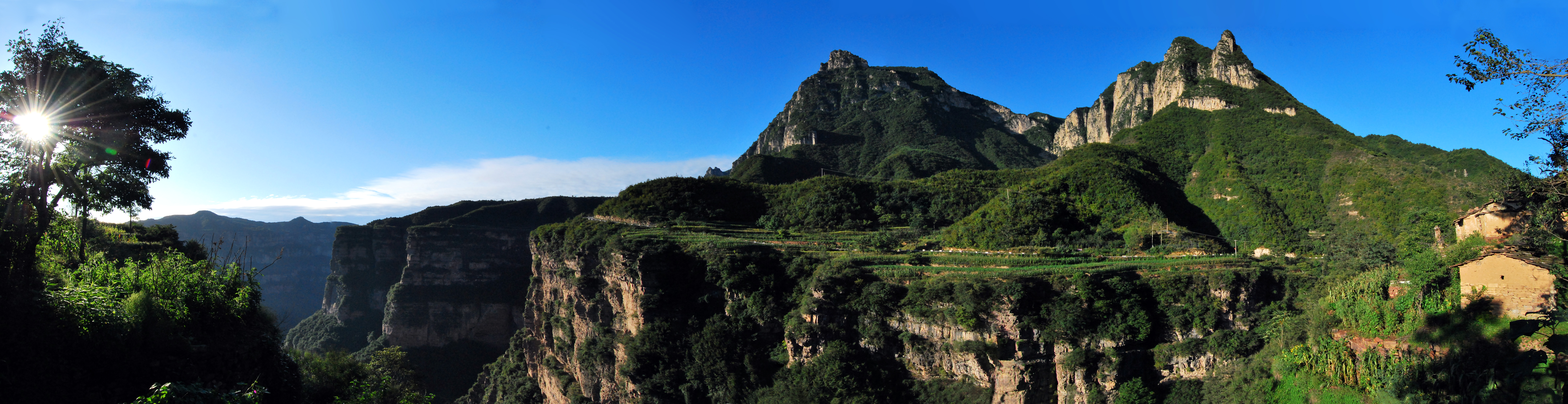 Taihang Mountains 太行山